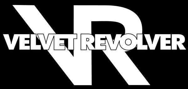 Velvet Revolver խմբի լոգոն